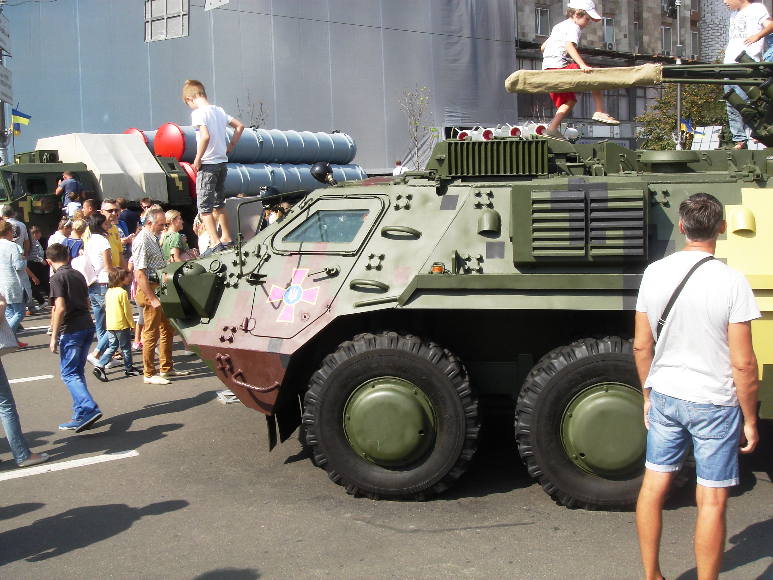 Виставка військової техніки на Хрещатику до 26-й річниці незалежності України